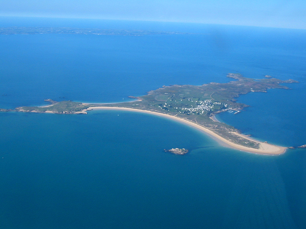 Île Houat.